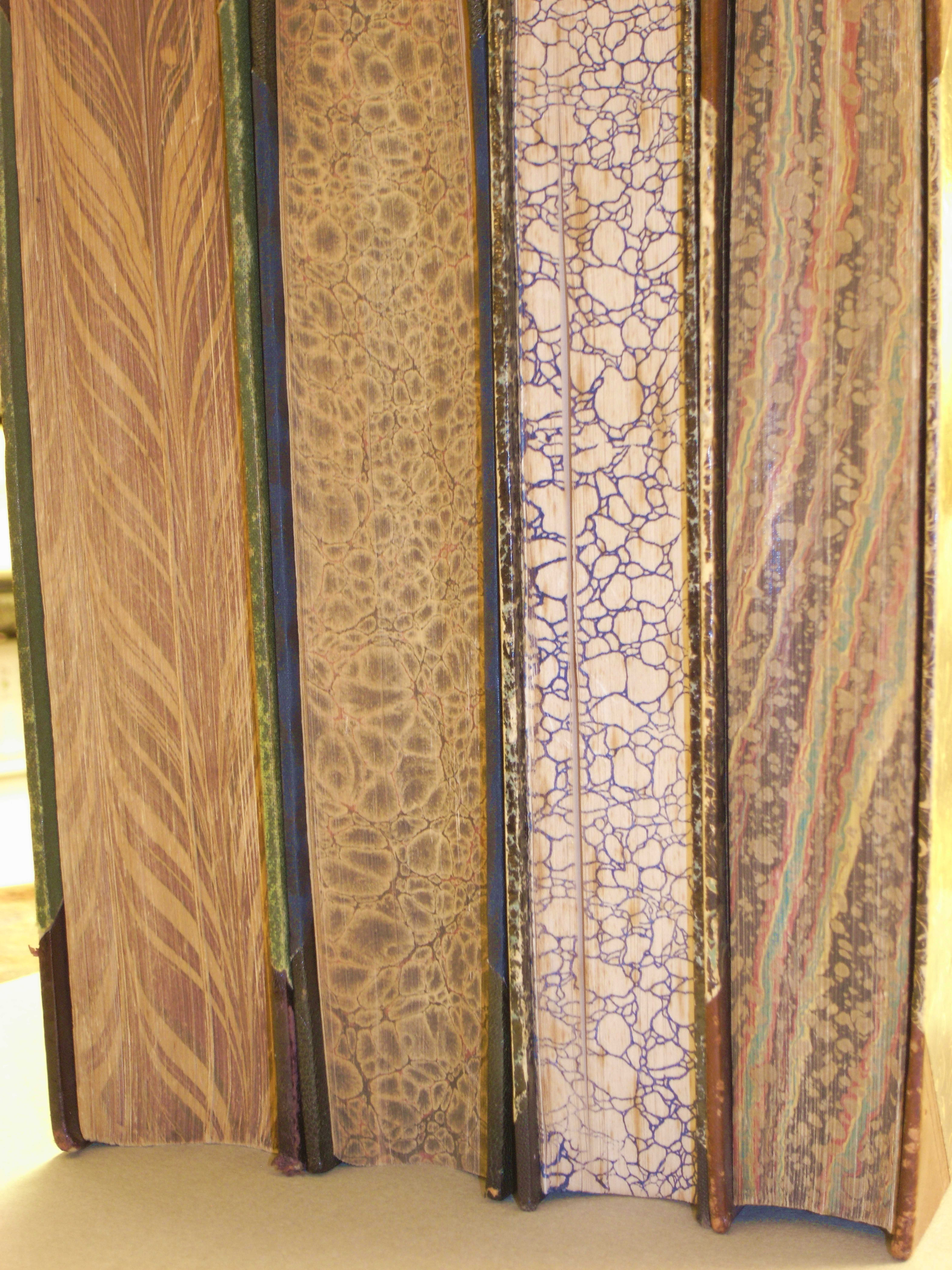 marmorierte Farbschnitte an Büchern (um 1900)